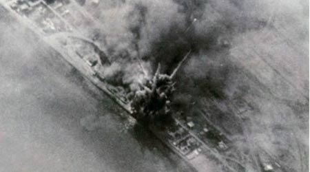 صورة جويّة لاستهداف سلاح الجوّ الإسرائيلي أحد أهم اجتماعات منظمة التحرير الفلسطيني في تونس.